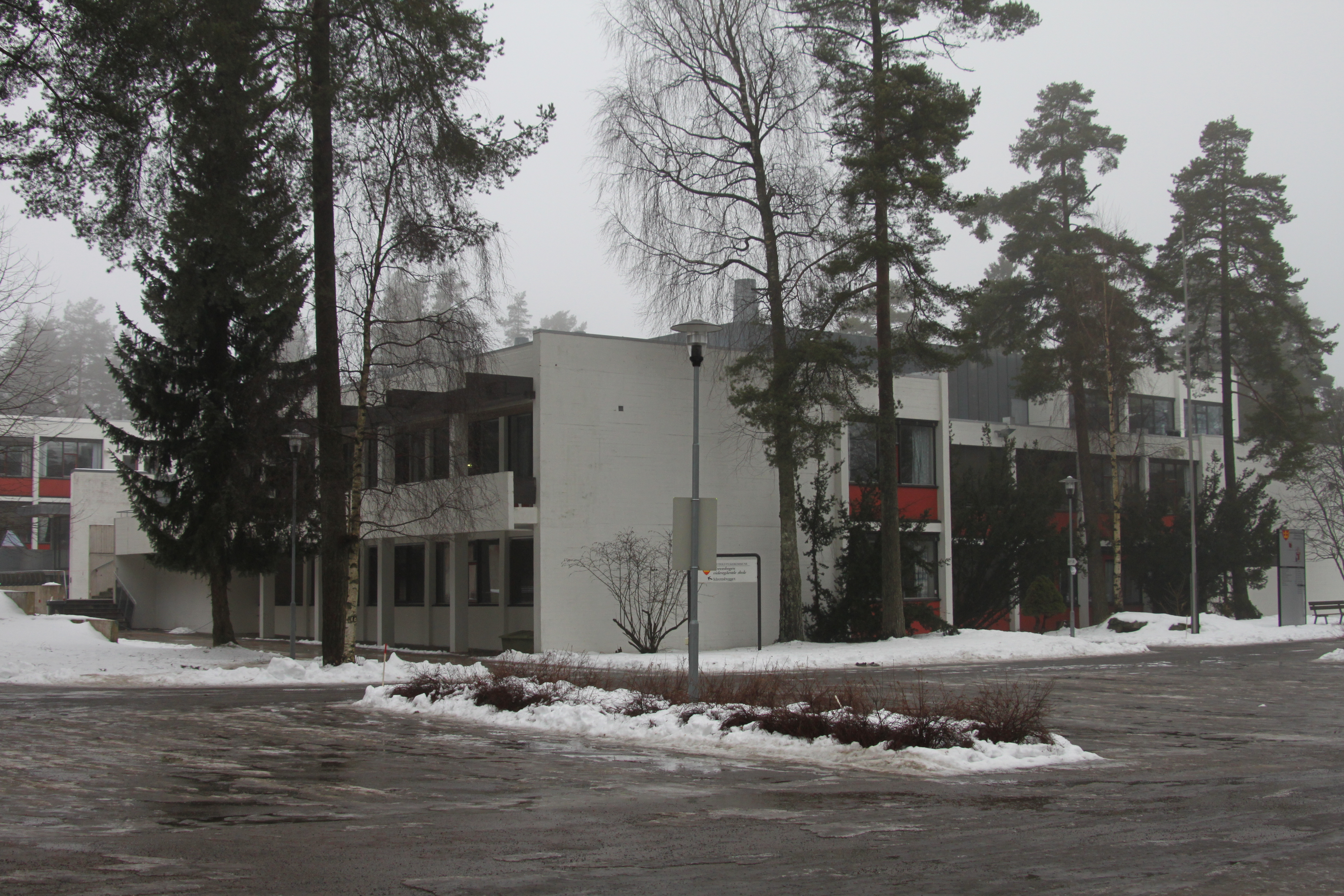 Greveskogen videregående skole, fra parkeringsplassen